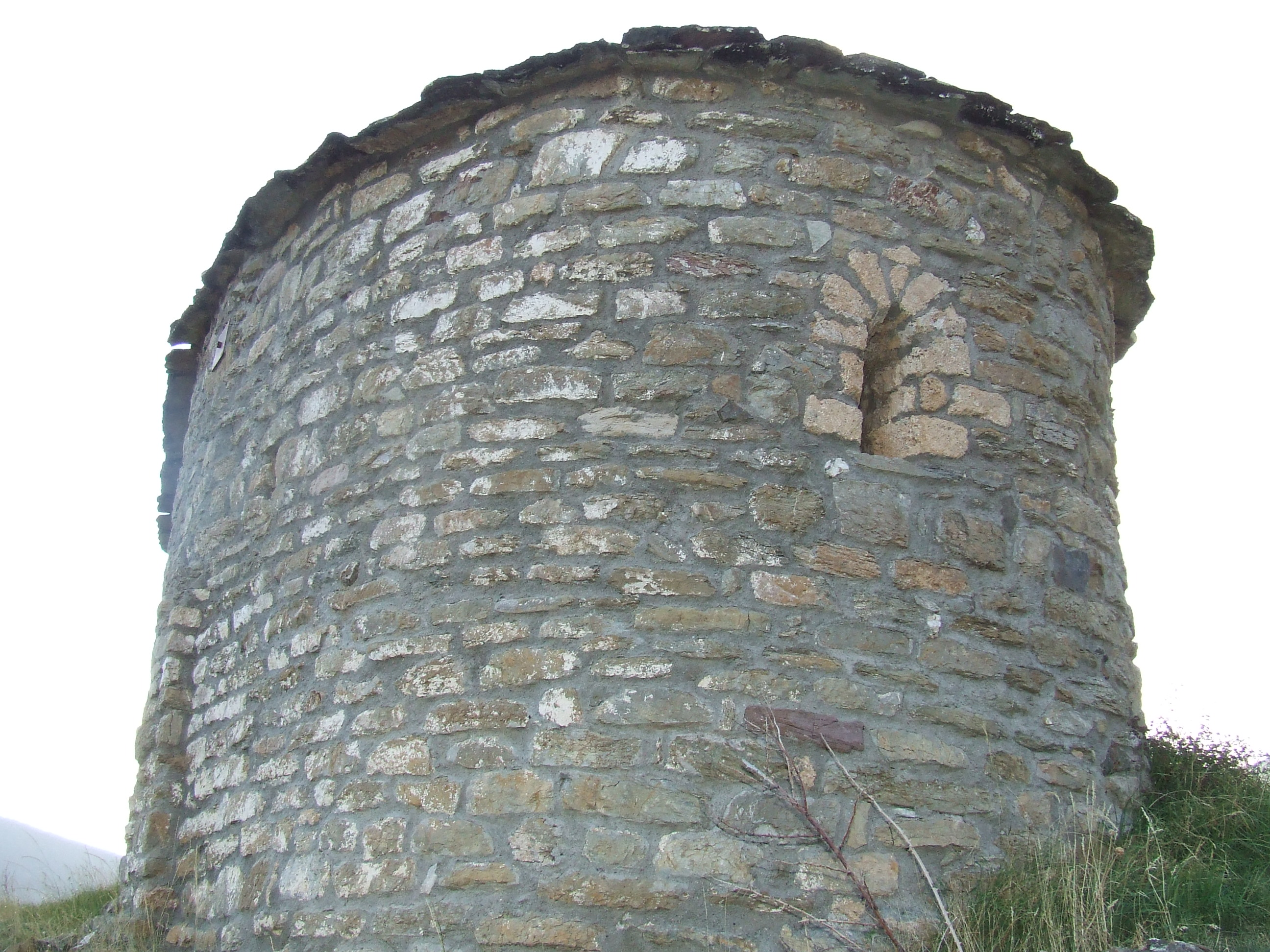 L'absis de Sant Cristau (Oveix, la Torre de Cabdella, Pallars Jussà)